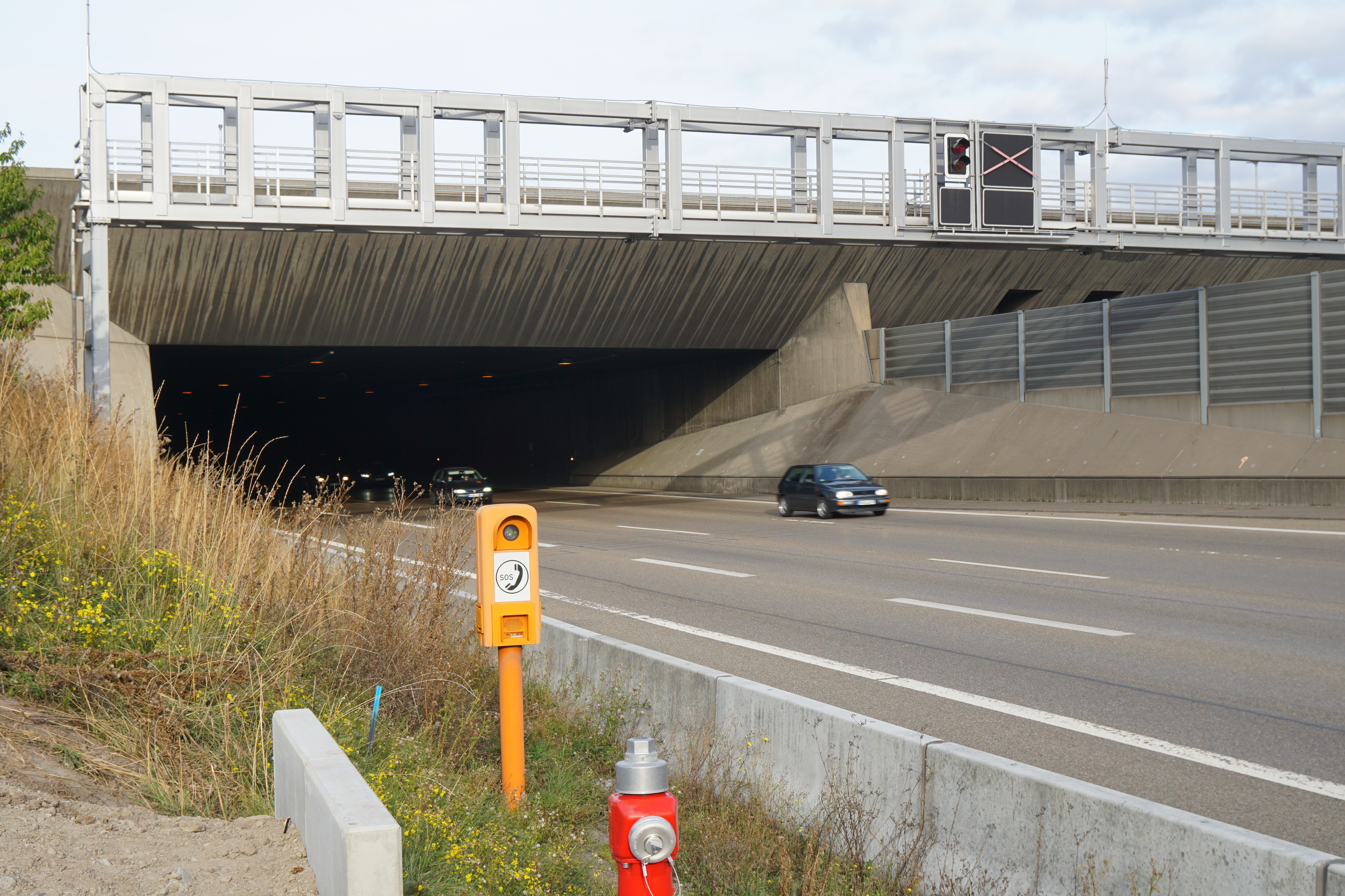 Engelbergtunnel Südportal und Autobahndreieck Leonberg